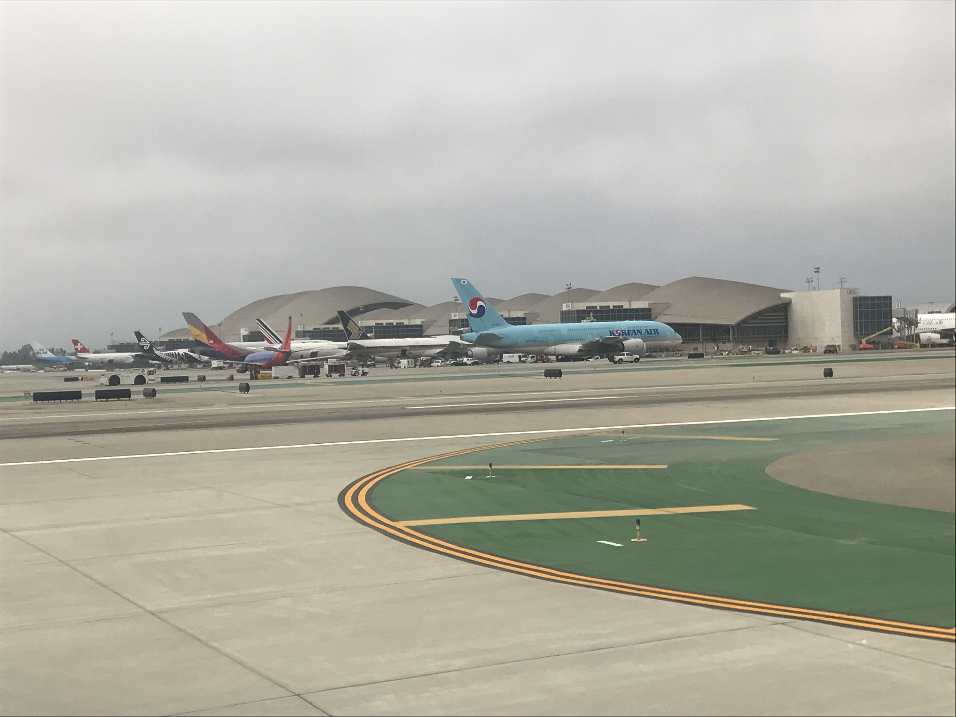 Terminal Tom Bradley en LAX.